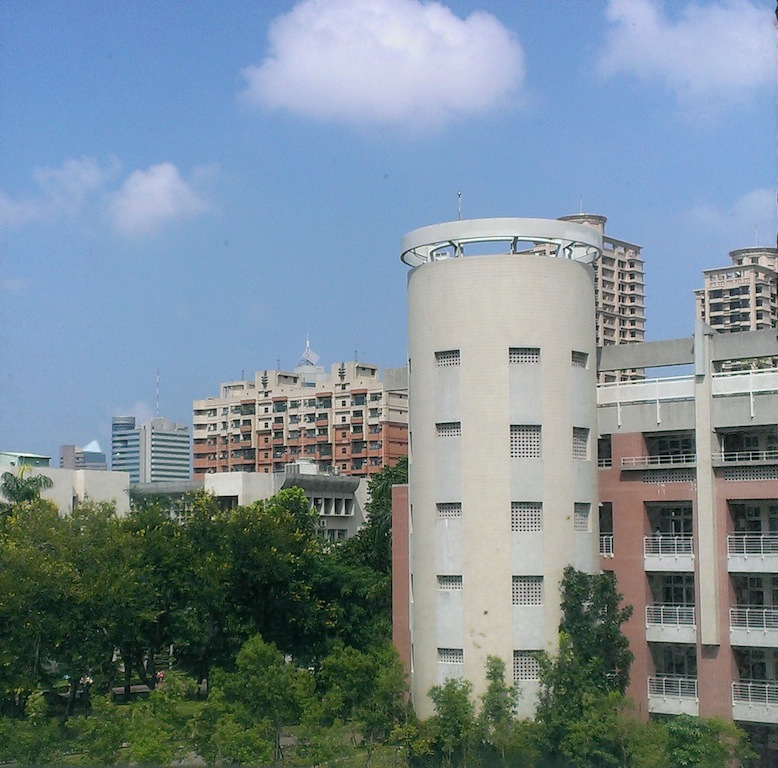 Bei Chen Building at Kaohsiung's ASHS school